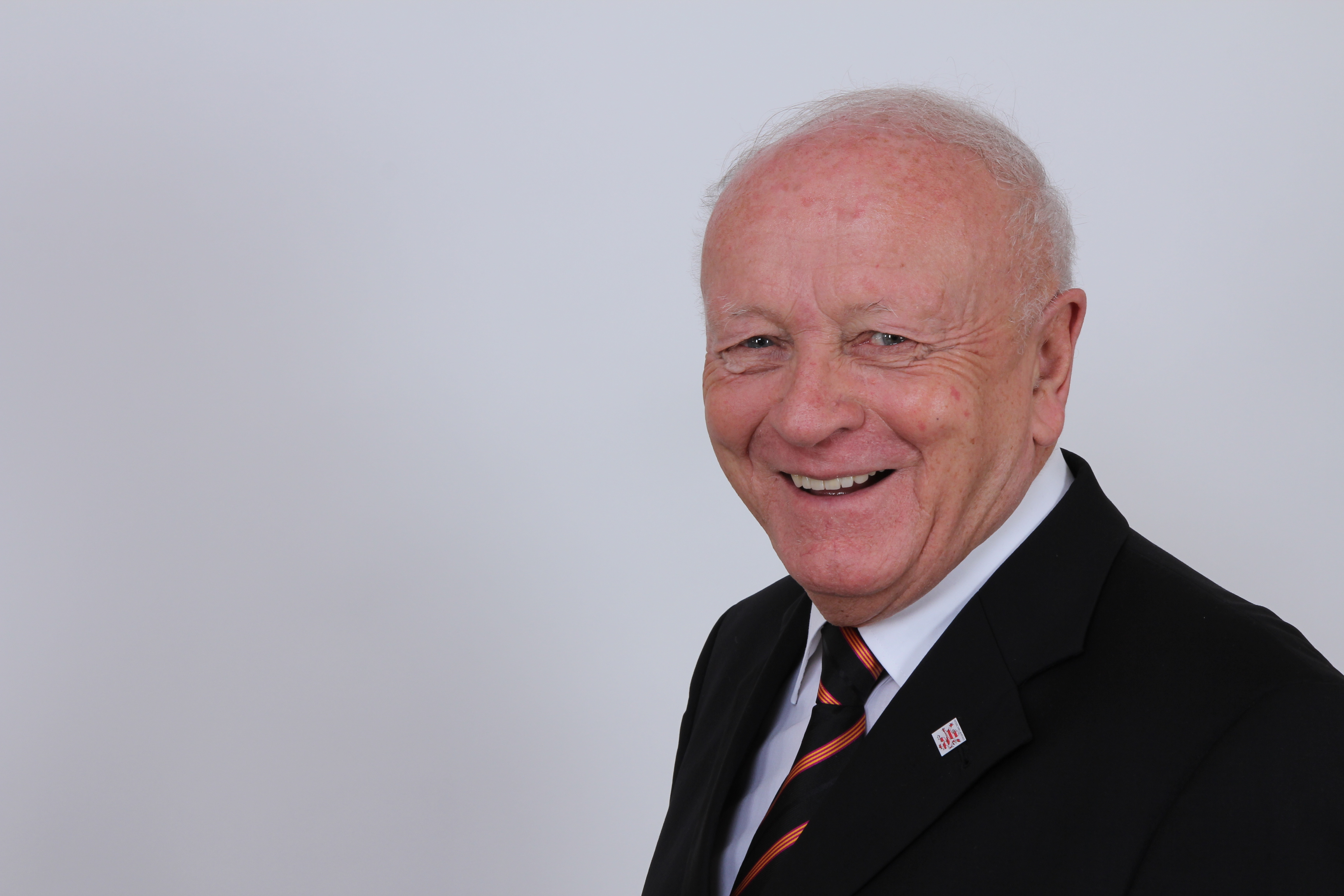 Horst Klee, (* 17. November 1939 in Wiesbaden), hessische Politiker (CDU) und Abgeordneter im Hessischen Landtag.